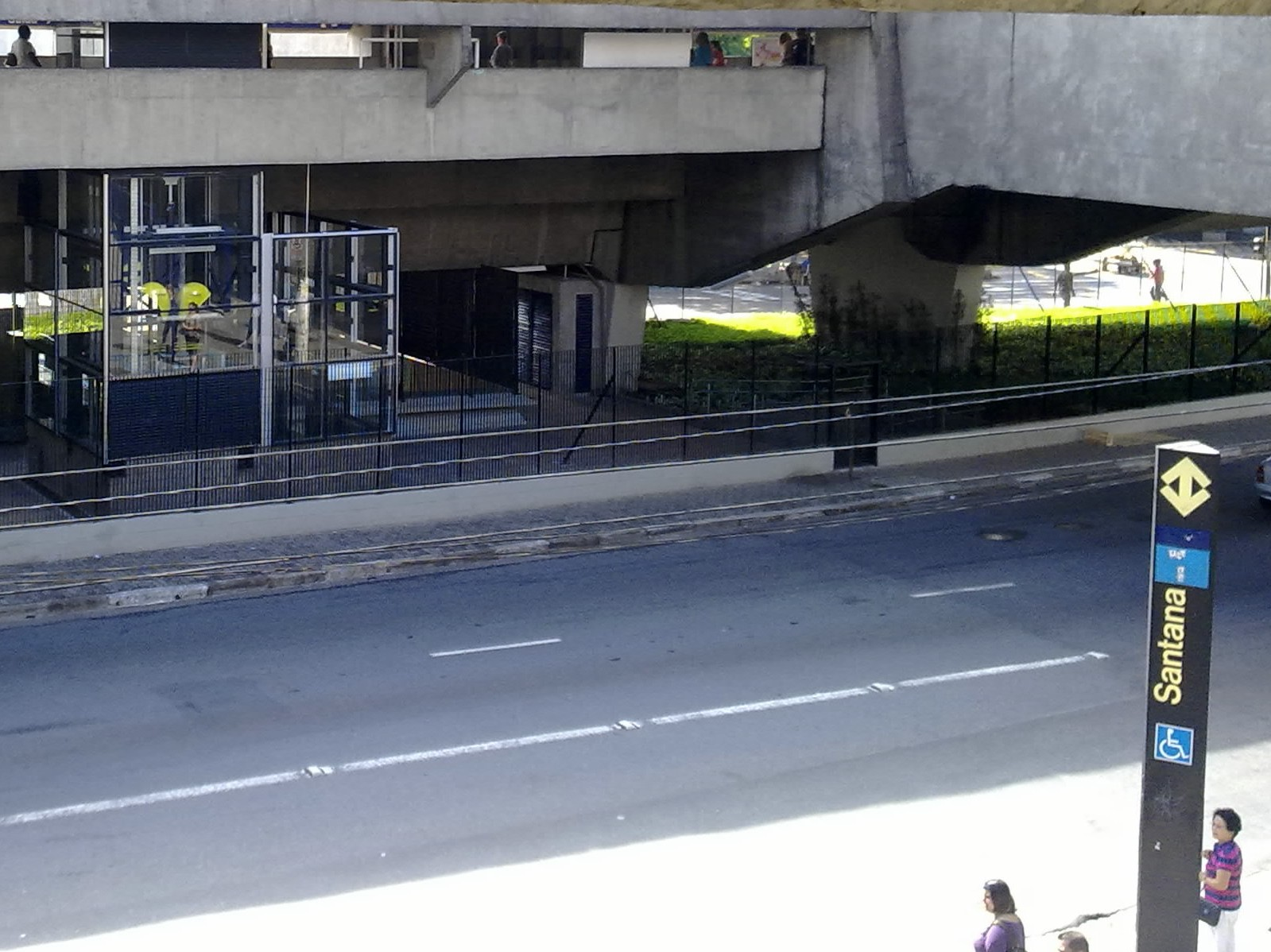 Foto dos elevadores da estação santana do metrô de são paulo.